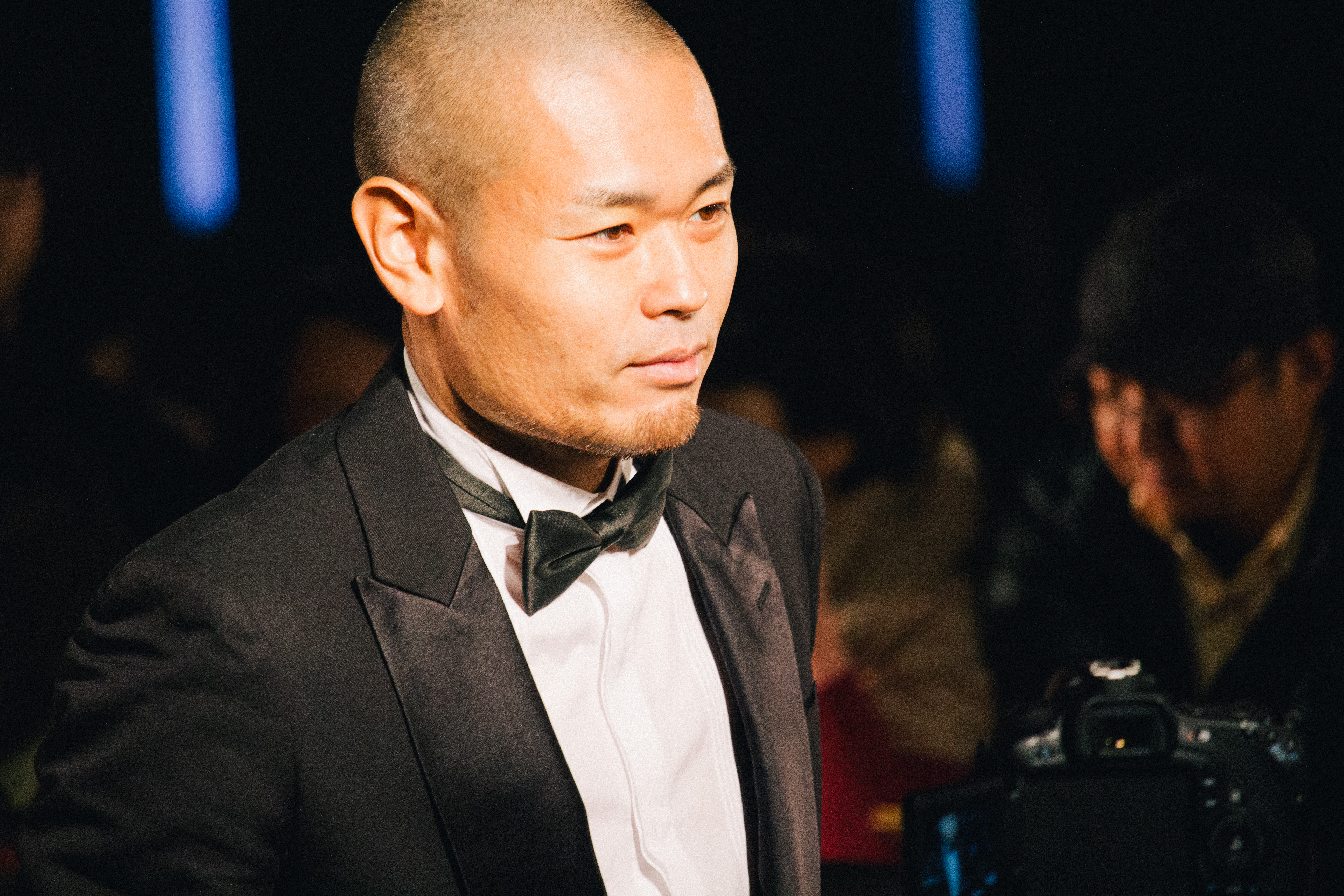 第27回 東京国際映画祭 品川ヒロシ